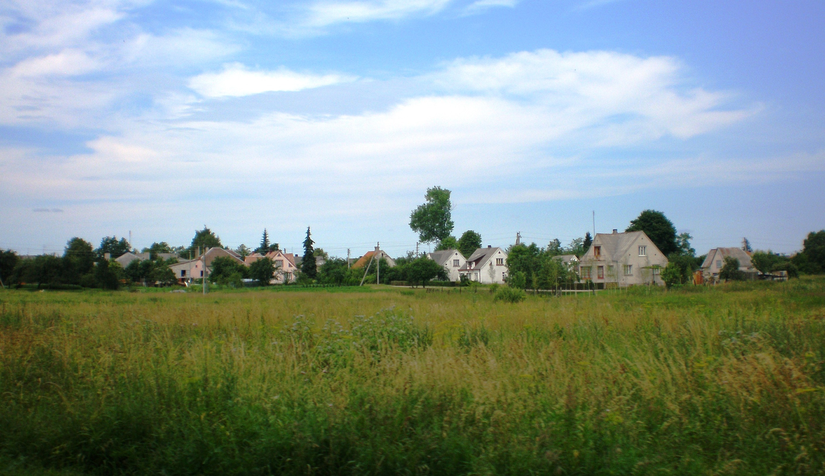 Kybartai, Vilkaviškio raj.